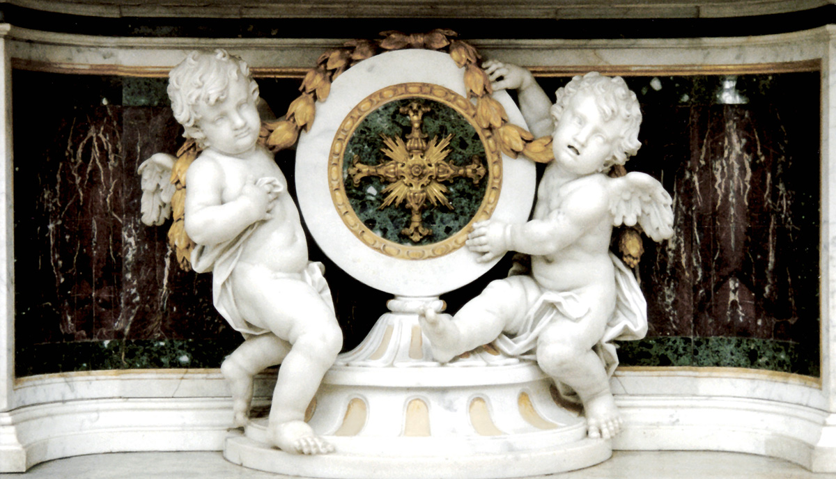 San Severo, chiesa di san Lorenzo: particolare dell'altare maggiore, opera di Giuseppe Sanmartino. Foto di Tobia Gorrio Licensing Categoria:San Severo